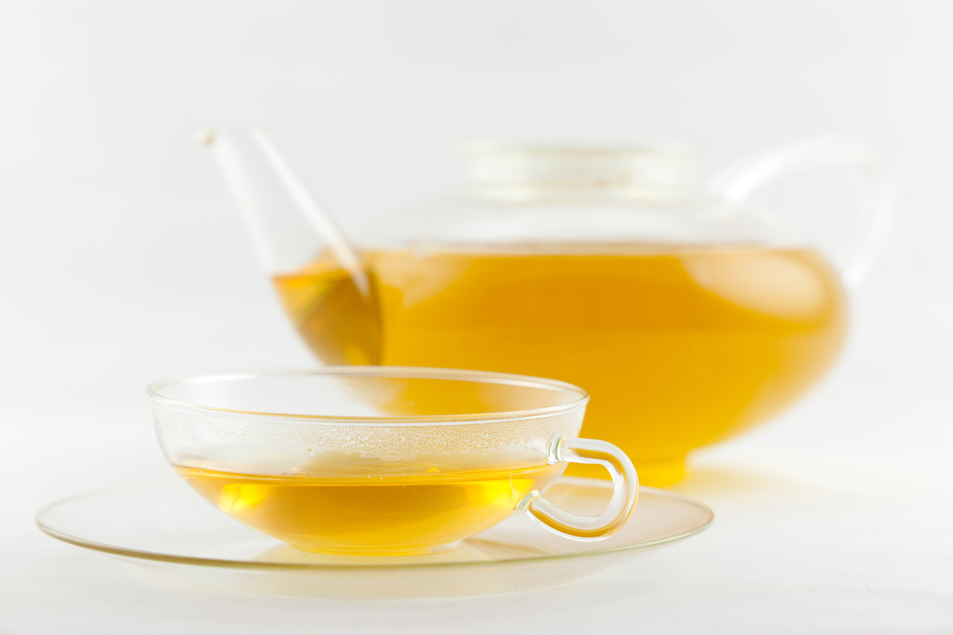 Frisch aufgebrühter Grüner Tee Gunpowder in Wagenfeld Service